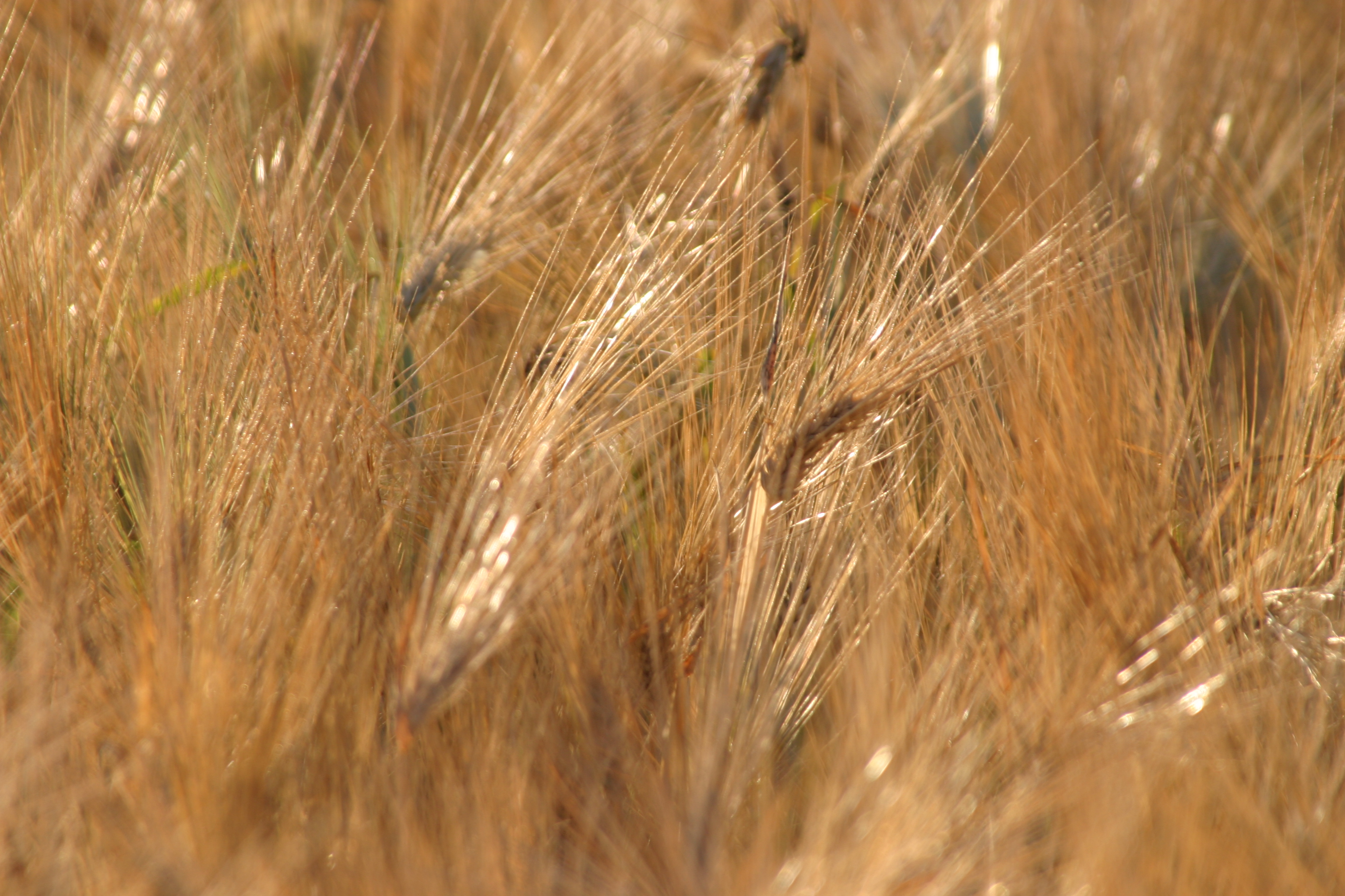 Hordeum vulgare